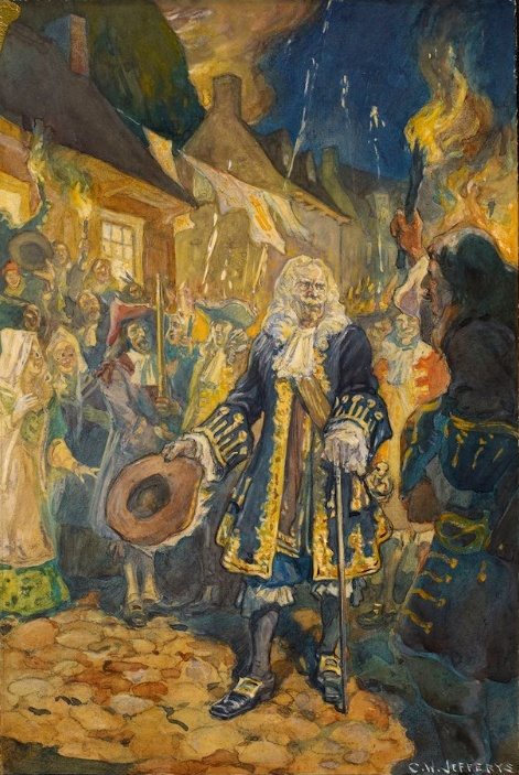 Frontenac revenant de France et arrivant à Québec en octobre 1689 après le massacre de Lachine et accueilli aux flambeaux par la population de la ville.